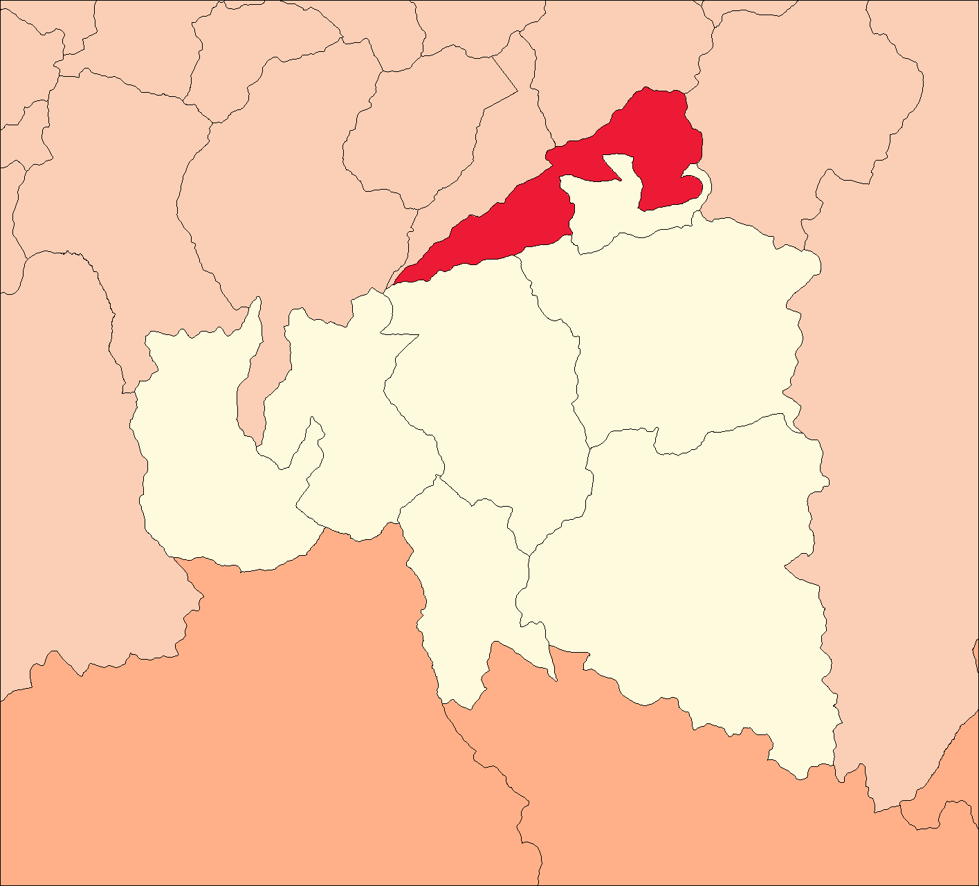 Área del distrito de Conchamarca.